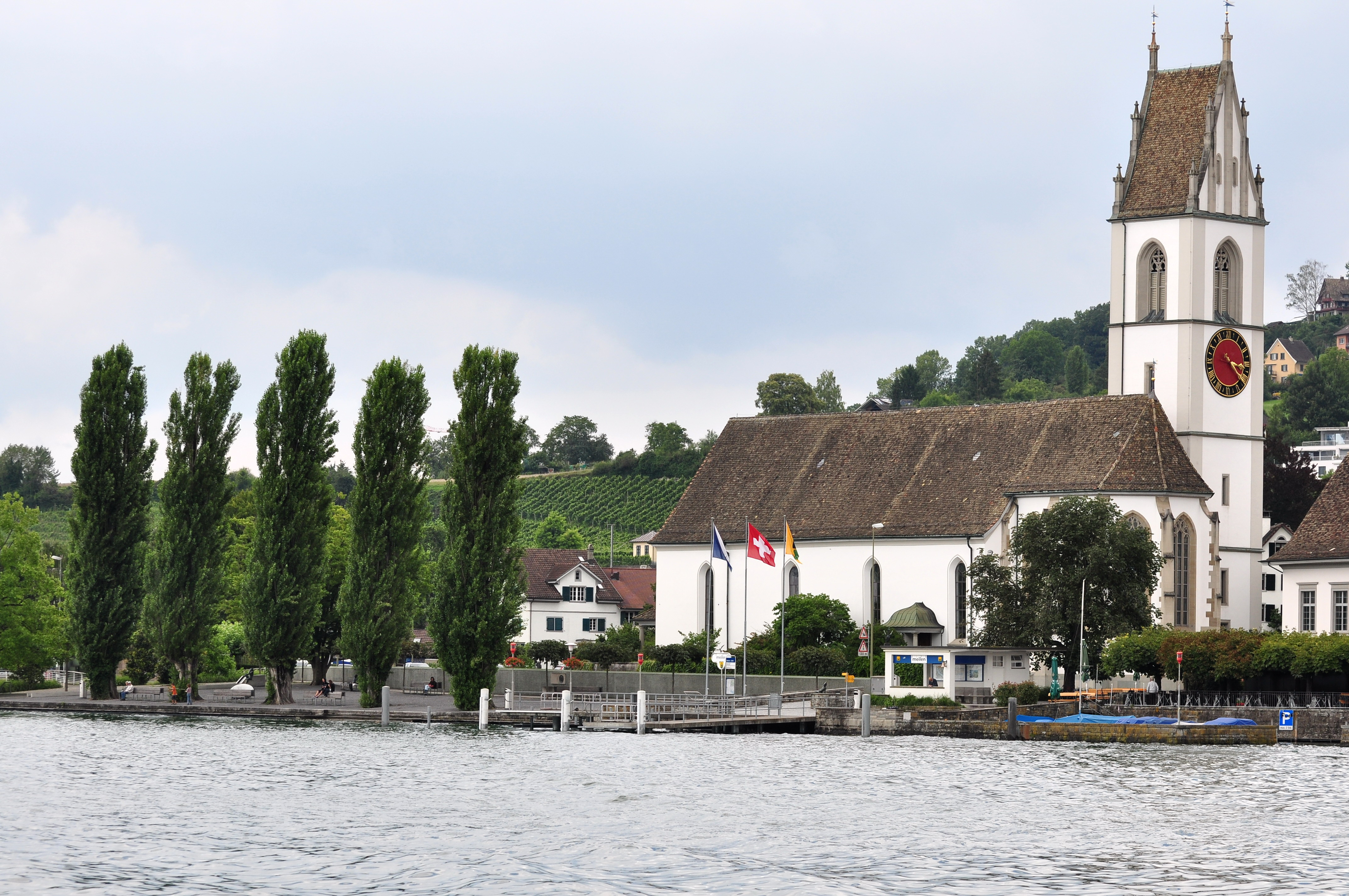 Meilen (Switzerland) as seen from ZSG motorship Wädenswil